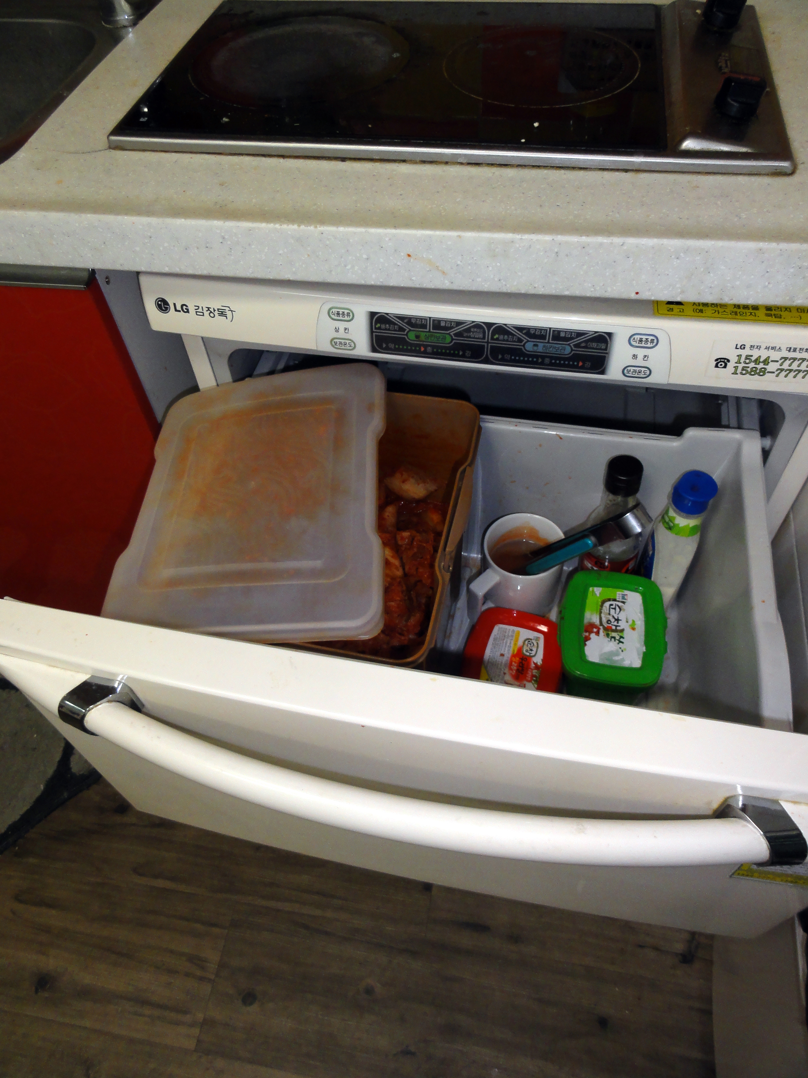 A special Kimchi storage unit